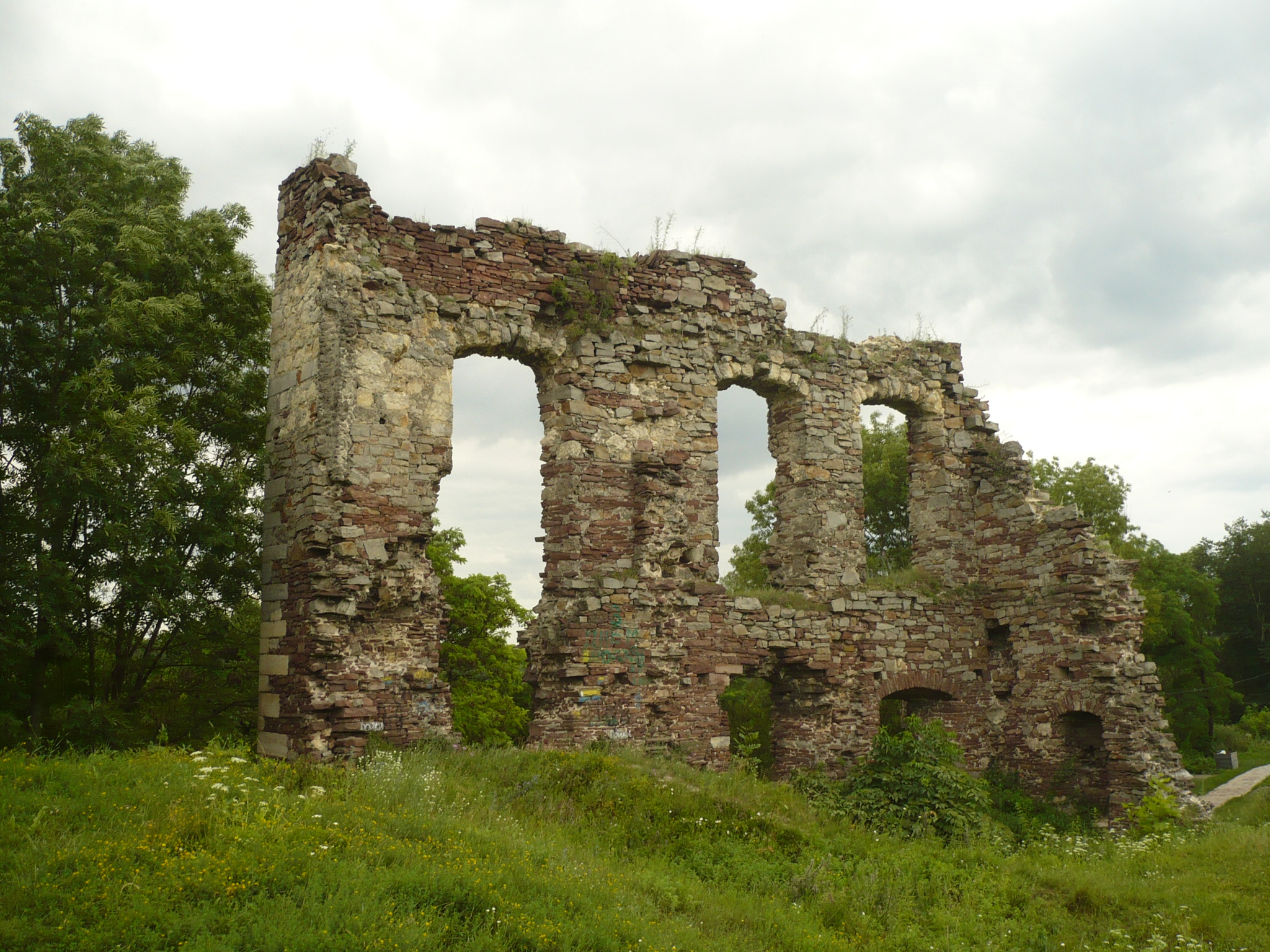 Buczacz. Zamek